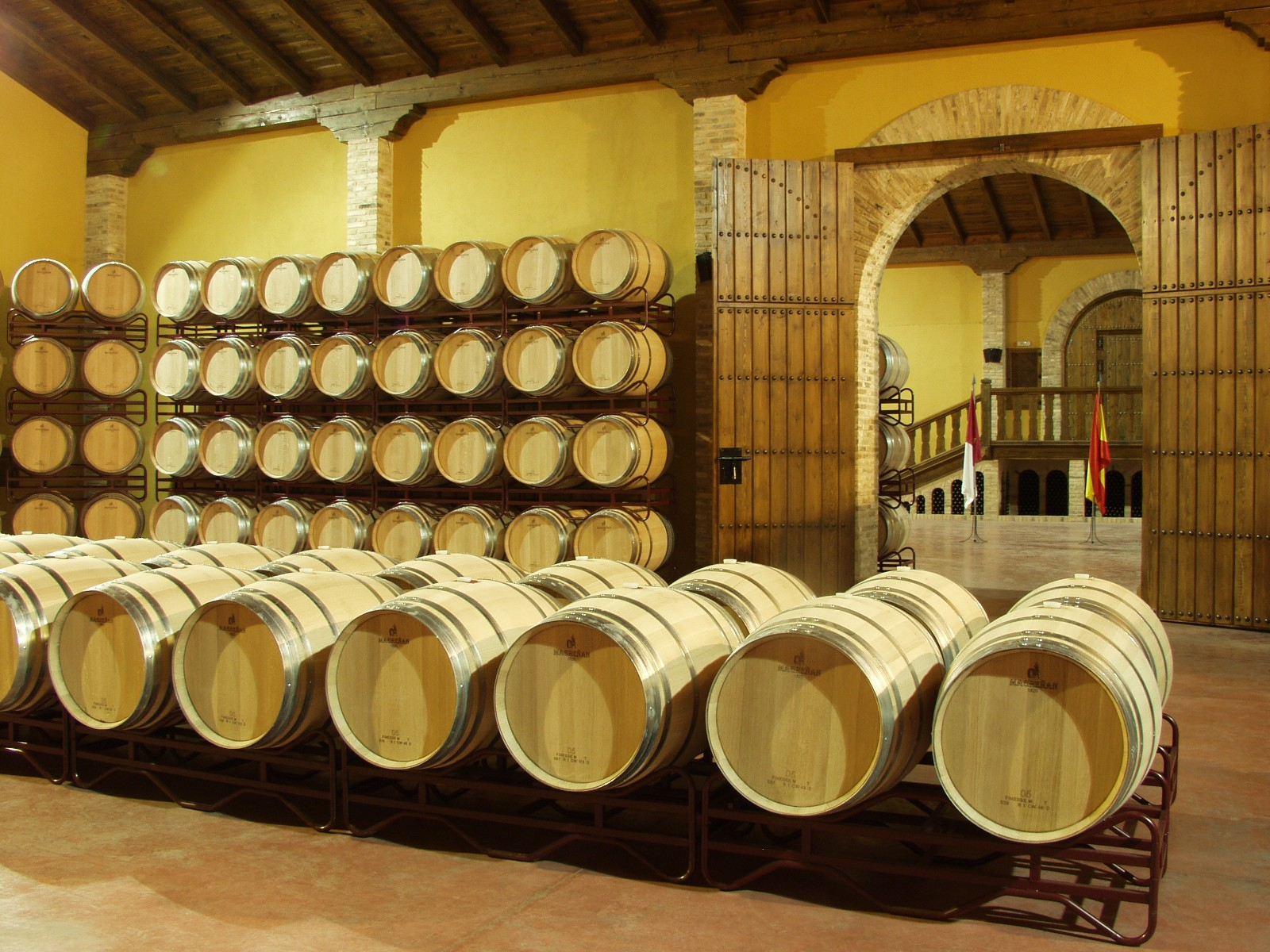 Foto realizada en la Sala de Crianza de Cristo de la Vega que cuenta con 1400 barricas de roble americano de tostado medio